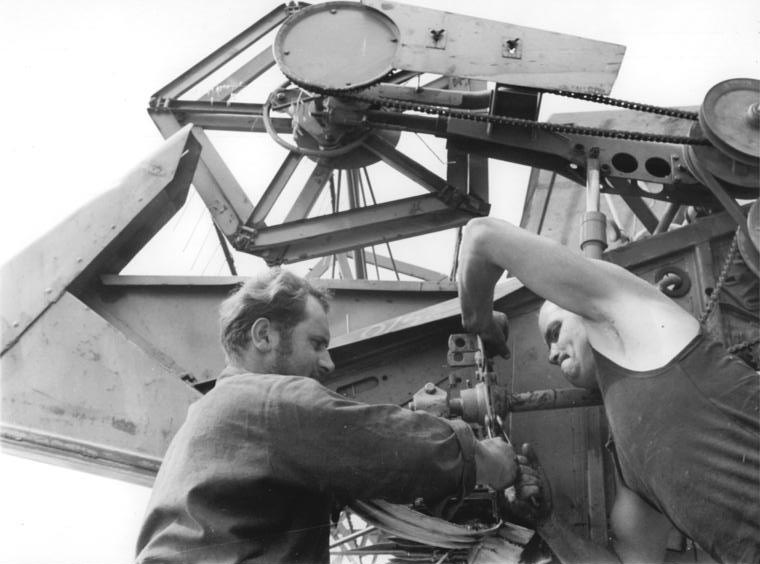 Waßmannsdorf, Reparatur eines Mähdreschers ADN-ZB Spremberg 7.8.71-sus-Bez. Potsdam: LPG Waßmannsdorf-Schnellreparatur während der Ernte - Manfred Schulze (l). vom landtechnischen Dienst Königswusterhausen, hier assistiert vom Mähdrescherfahrer Erich Säfke, stellt die Messerführung ein, prüft die Kupplung und sichert einen schnellen Wiedereinsatz des Mähdreschers E 512.